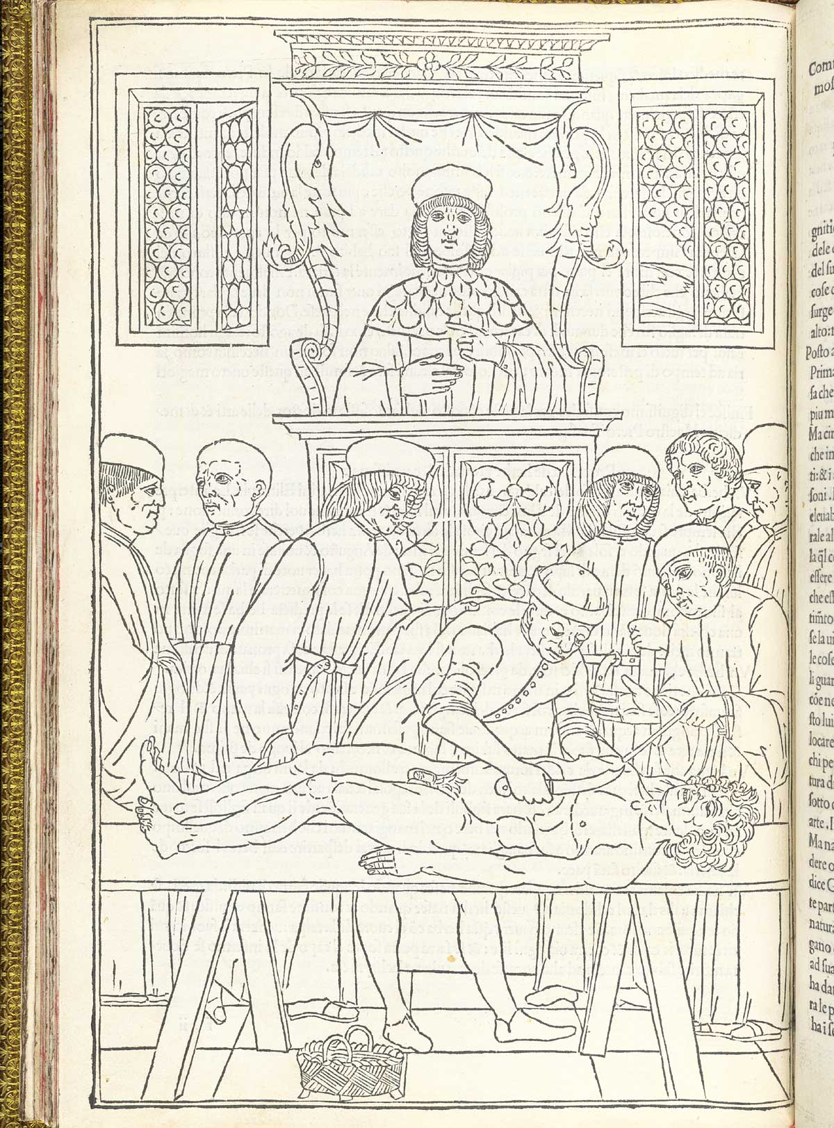 Johannes de Ketham. Fasiculo de Medicina. (Venice, 1495).